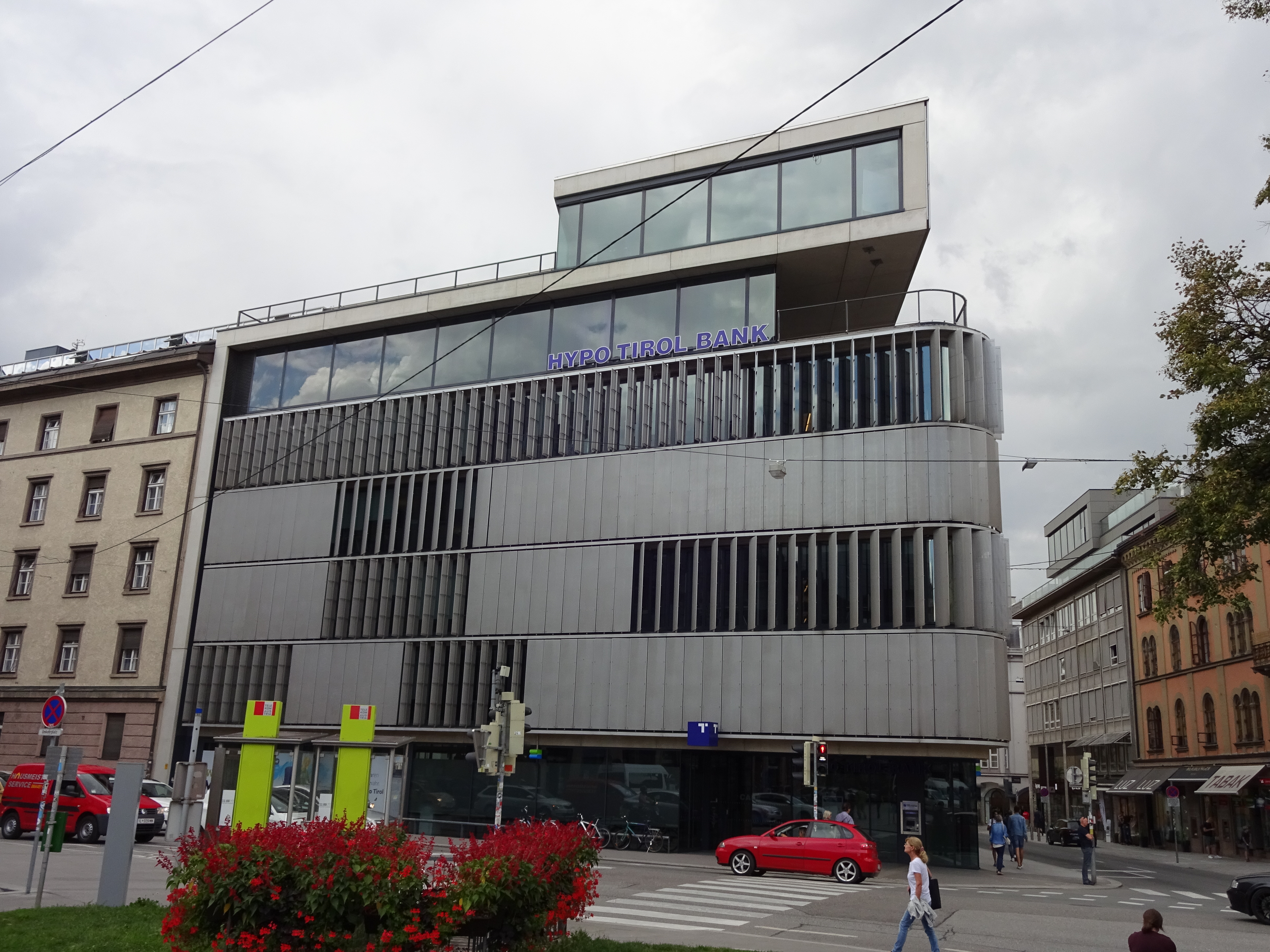 Zentrale der Hypo Tirol Bank, Bozner Platz, Innsbruck (Schlögl & Süß Architekten 2008) This media shows the remarkable cultural object in the Austrian state of Tyrol listed by the Tyrolean Art Cadastre with the ID 120626. (on tirisMaps, pdf, more images on Commons, Wikidata)